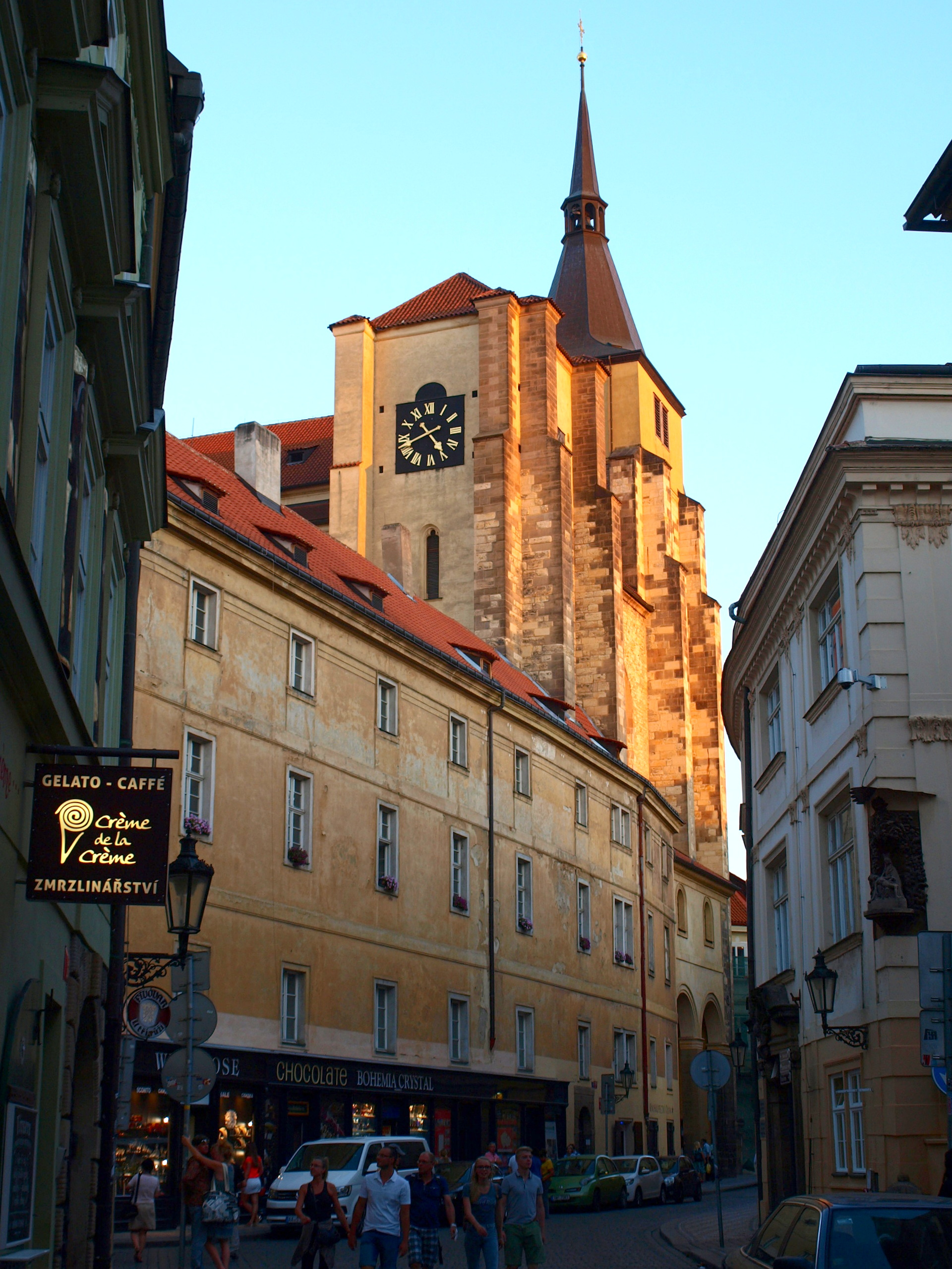 Kostel svatého Jiljí